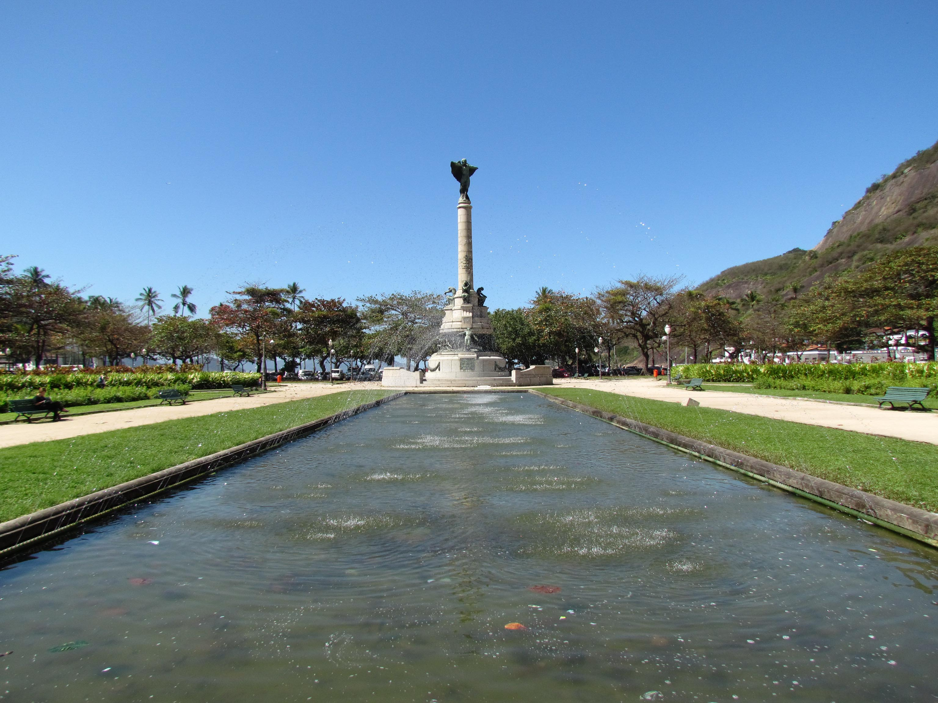 Praça General Tibúrcio - Urca, Rio de Janeiro.